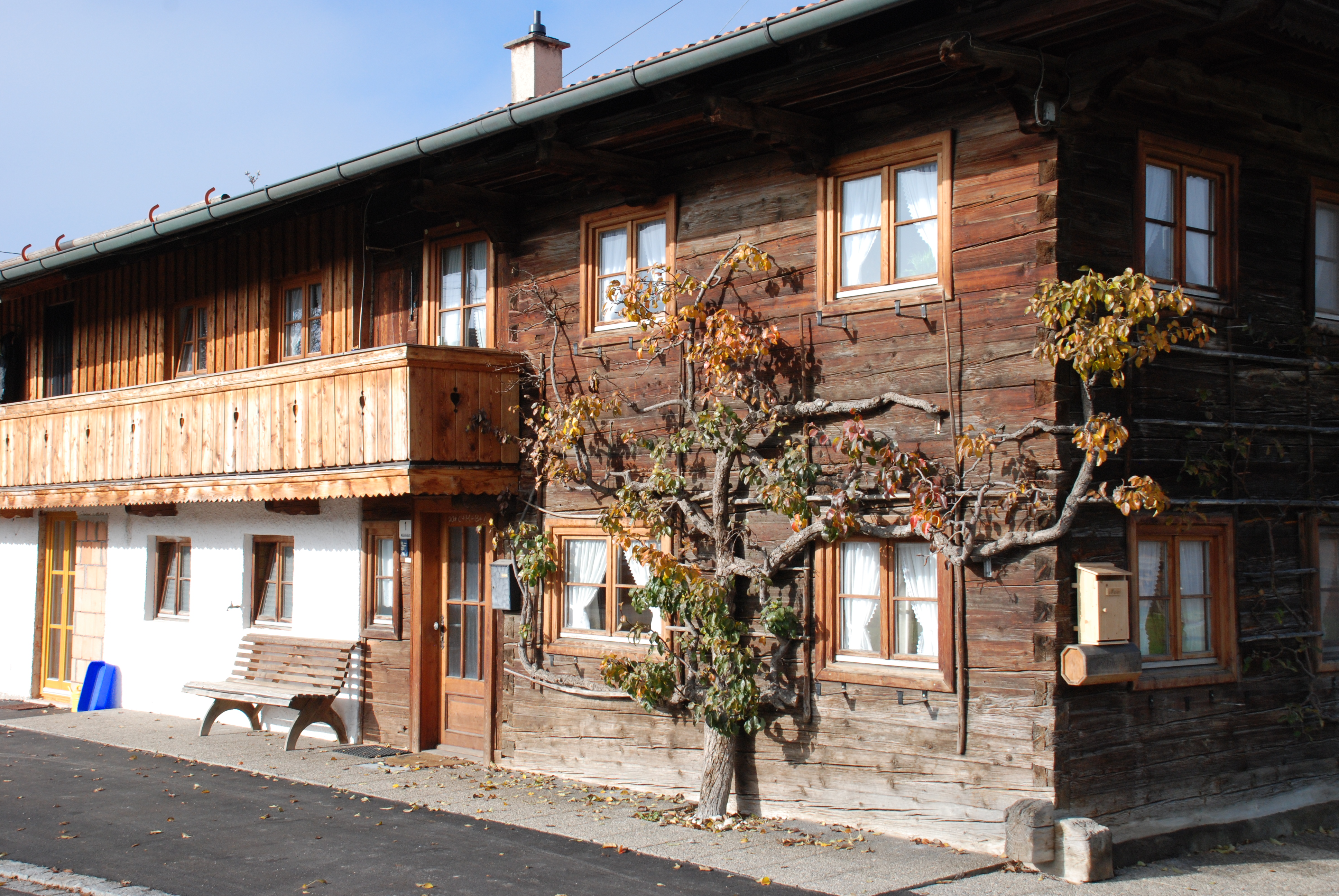 Bauernhaus „Beim Utzn“ in der Mühlfeldstraße 1 in Unterdarching, Gemeinde Valley, Landkreis Miesbach, Regierungsbezirk Oberbayern, Bayern. Als Baudenkmal unter Aktennummer D-1-82-133-49 in der Bayerischen Denkmalliste aufgeführt.